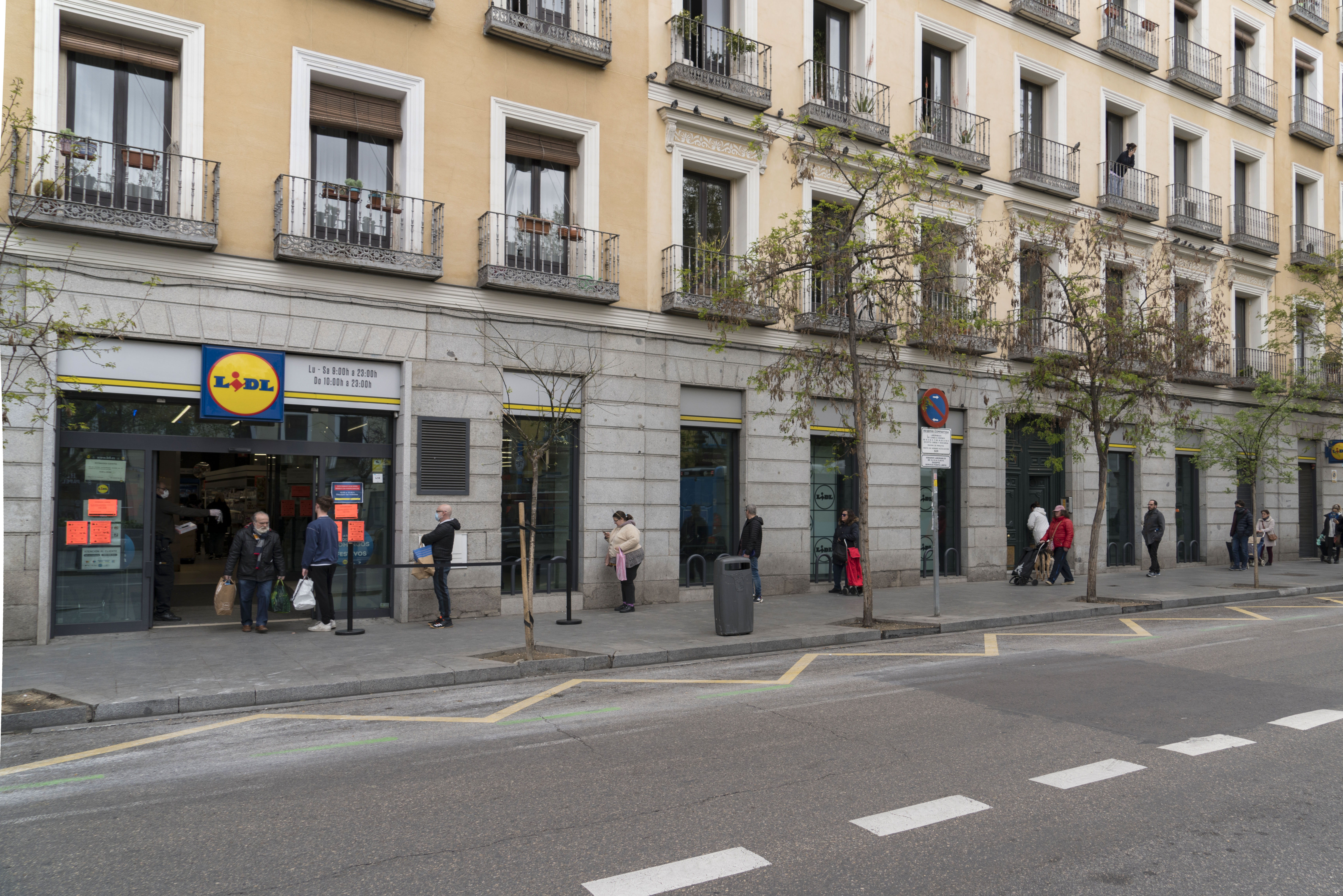 Cola frente a un establecimiento de alimentación, Madrid, 22 de marzo, una semana de cuarentena.